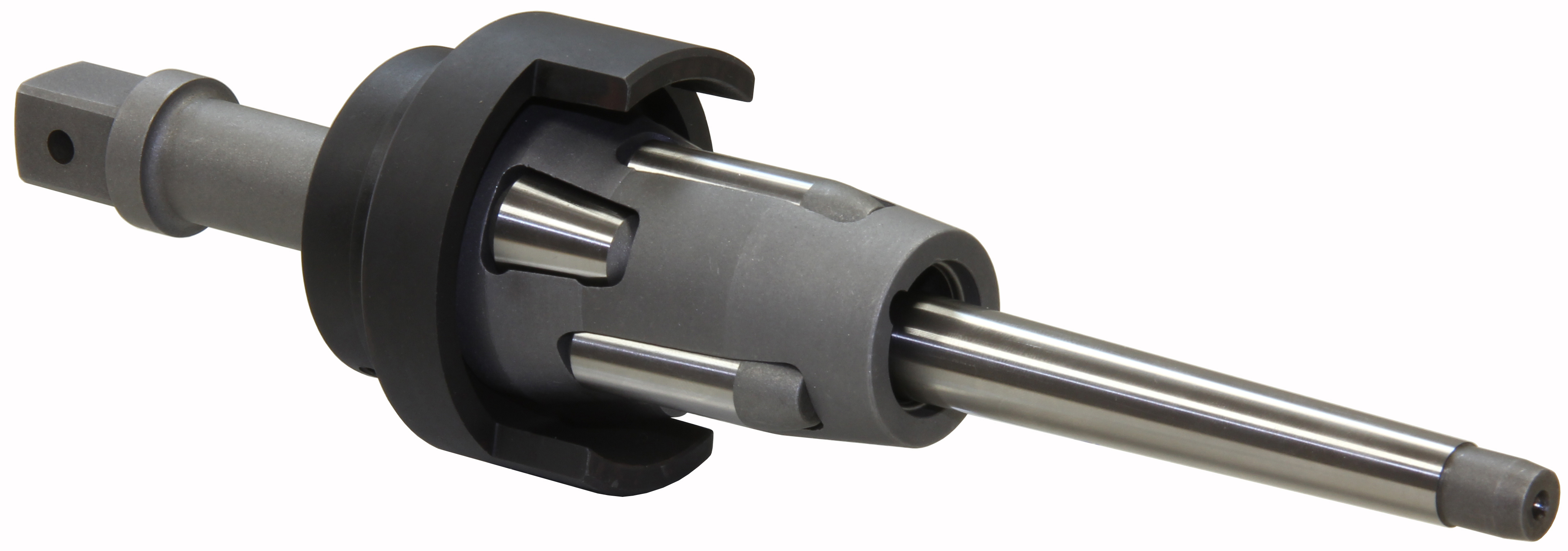 Вальцовка ЕКО. Крепежно-отбуртовочная вальцовка с фиксированной глубиной вальцевания и невыпадающими роликами. Применяется для закрепления и отбуртовки труб.